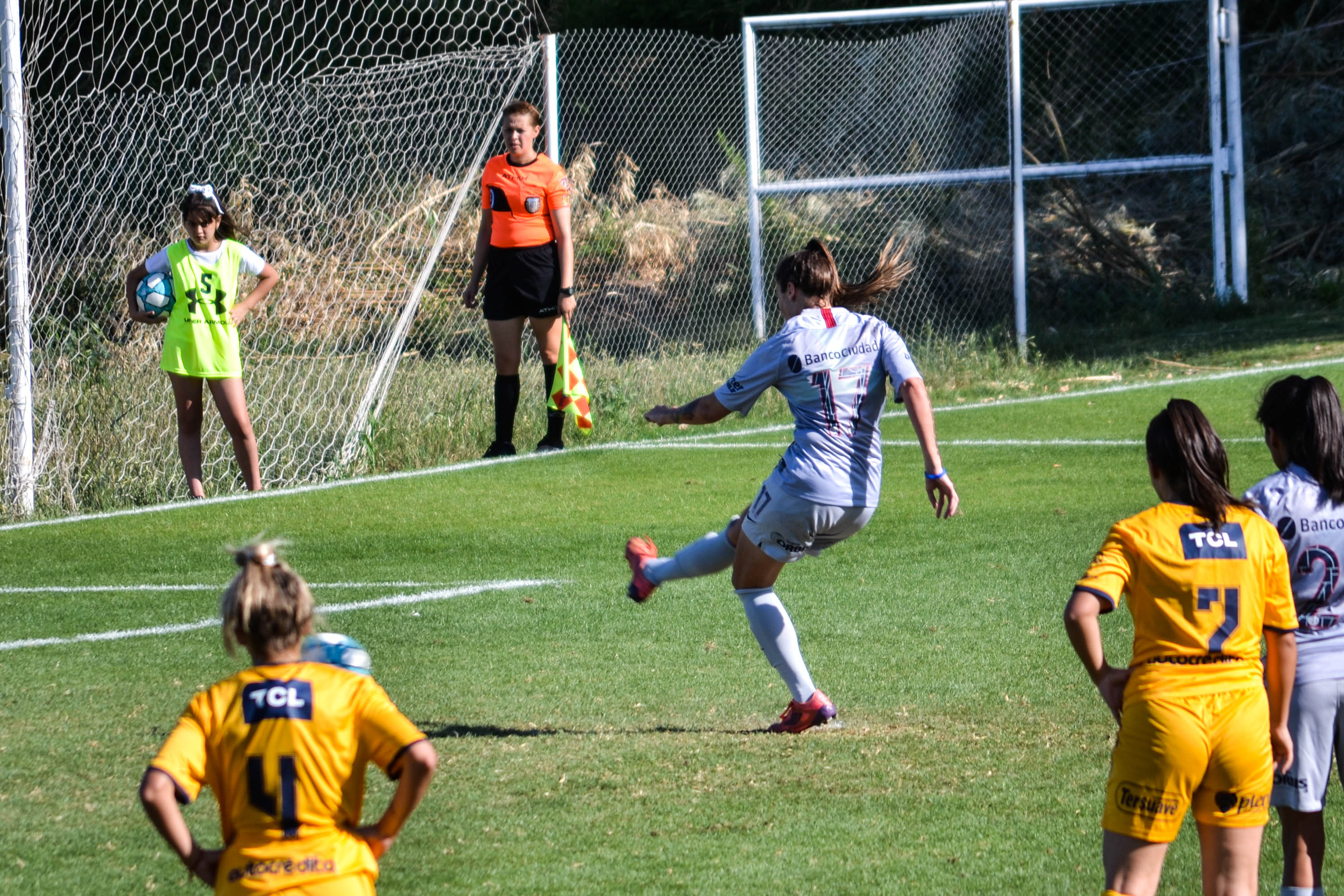 San lorenzo rosario central futbol femenino